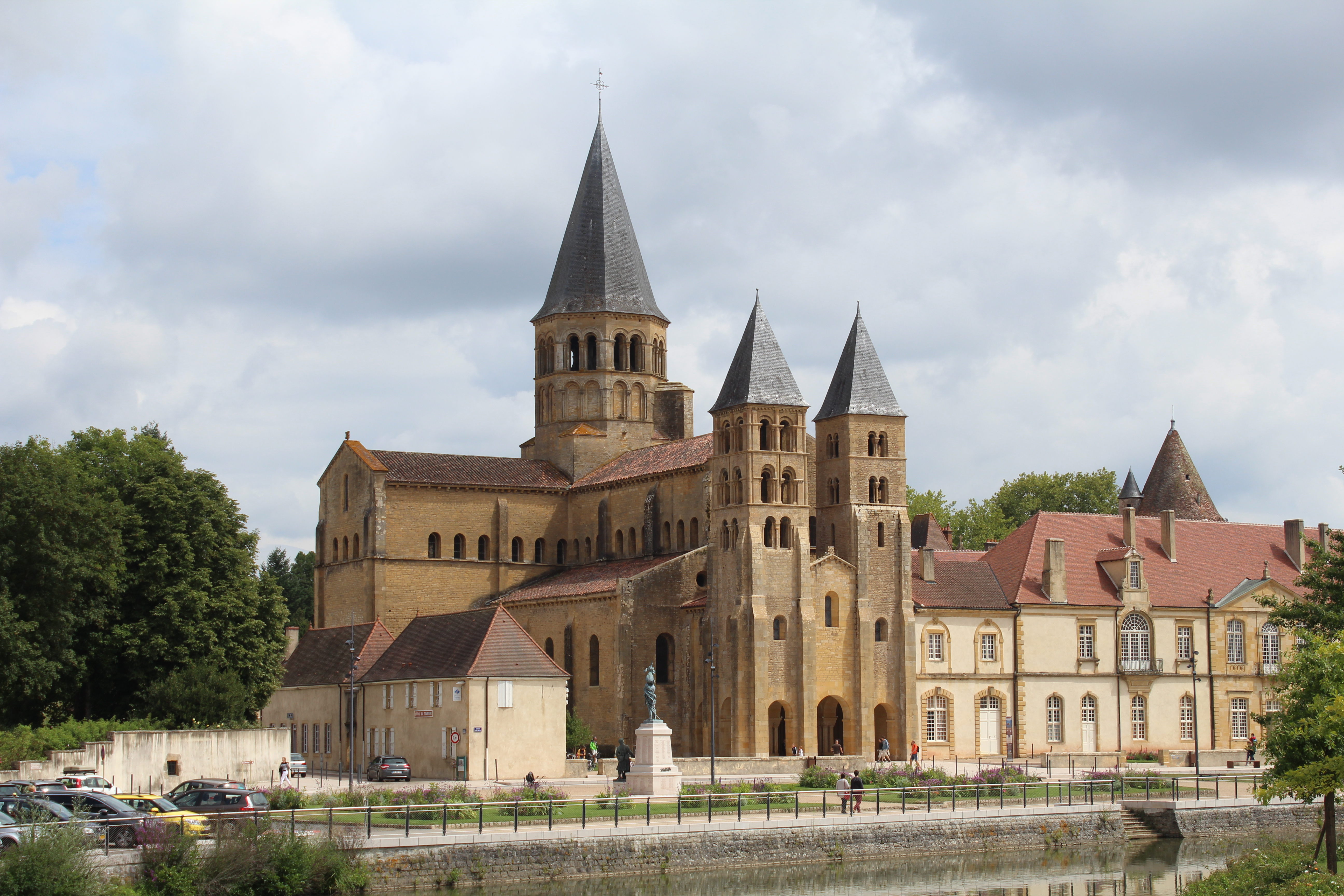 Basilique du Sacré-Coeur de Paray-le-Monial.